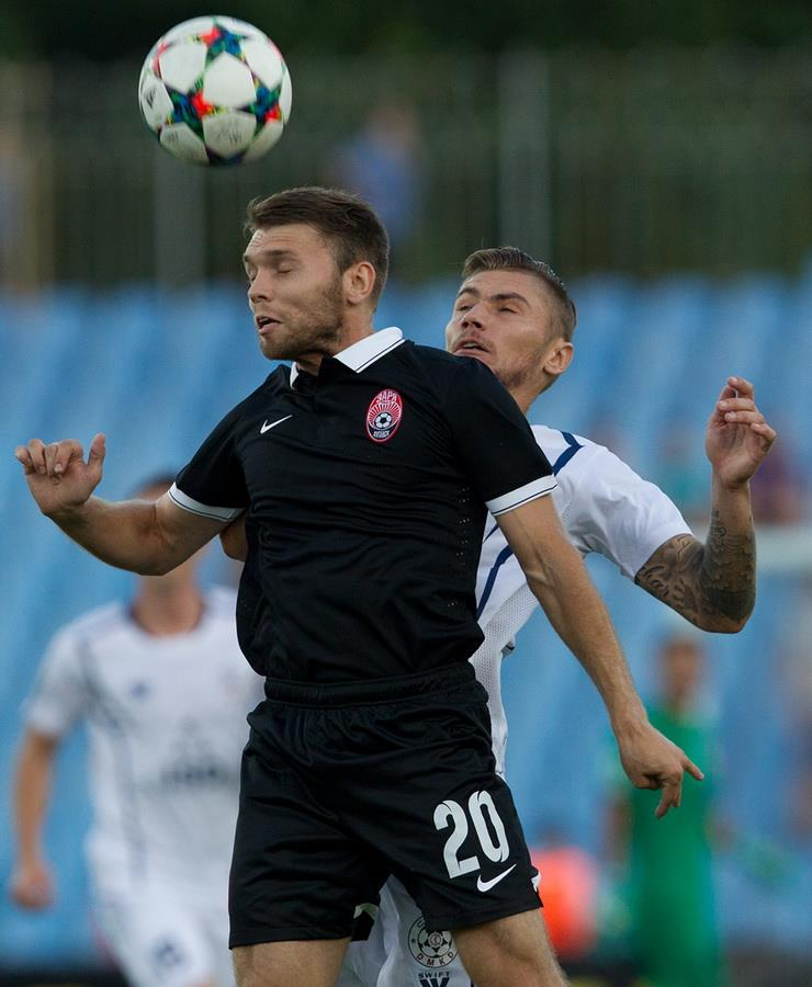 Олександр Караважв - футболіст Зорі